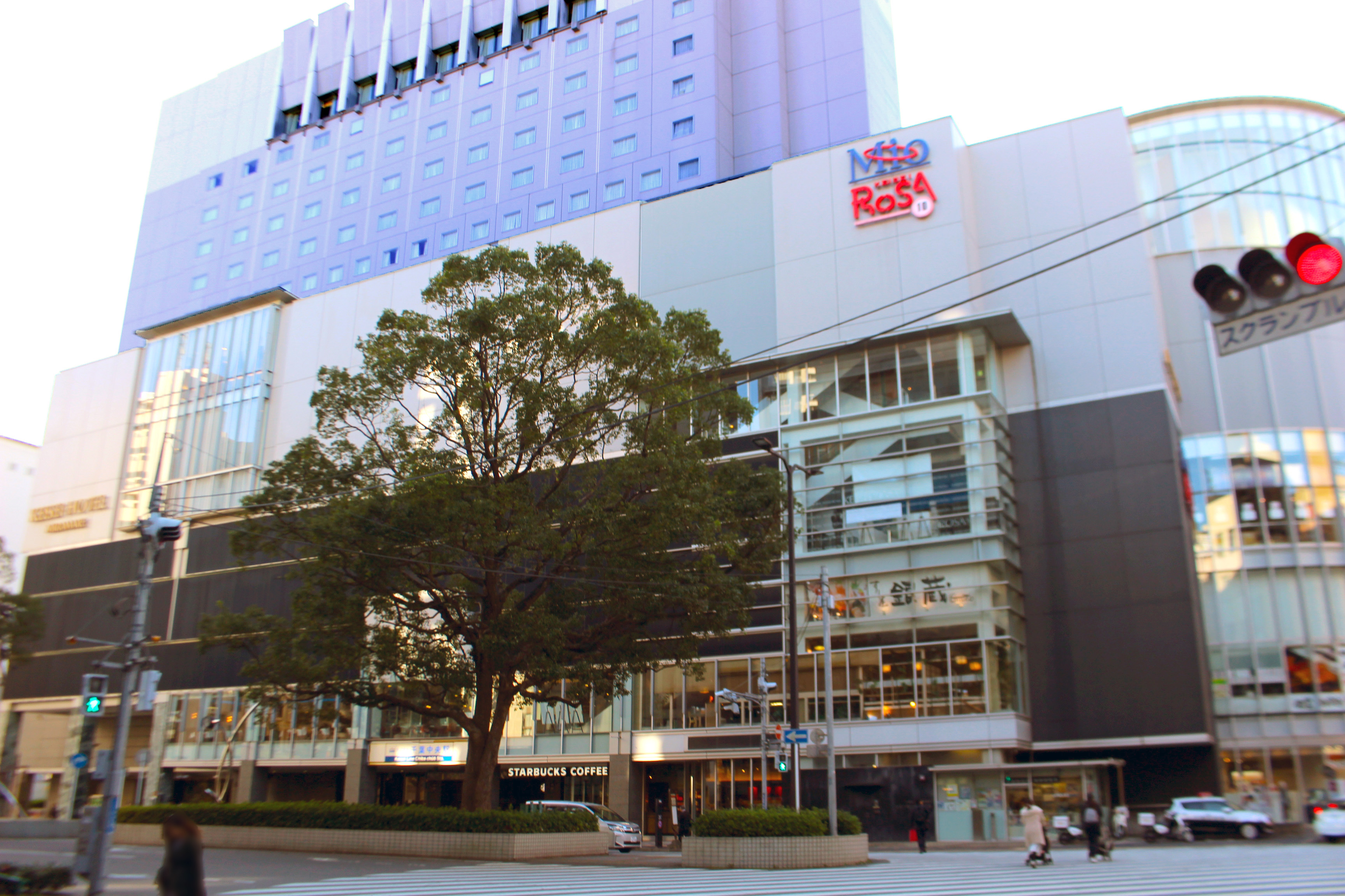 千葉中央駅東口（Chiba-Chūō Station East）